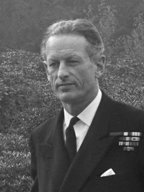 Koningin Juliana ontvangt admiraal Sir William O'Brien (voorzitter Channel Command van Engelse Marine) op Soestdijk 13 oktober 1970